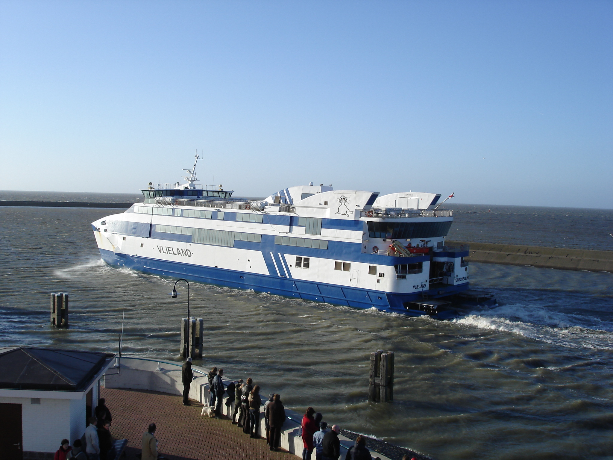 Vlieland vertrekt uit Harlingen For ship details and history see her category:IMO 9303716